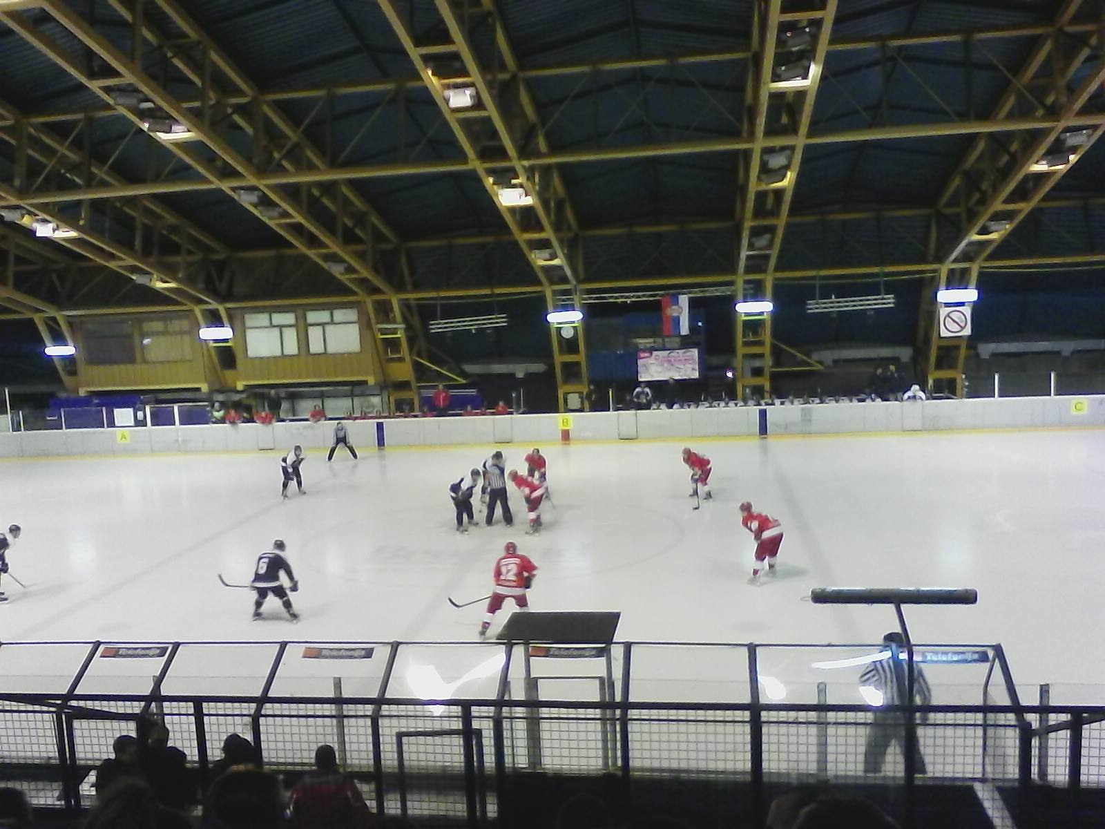 Српски (ћирилица): Утакмица између Црвене звезде и Партизана